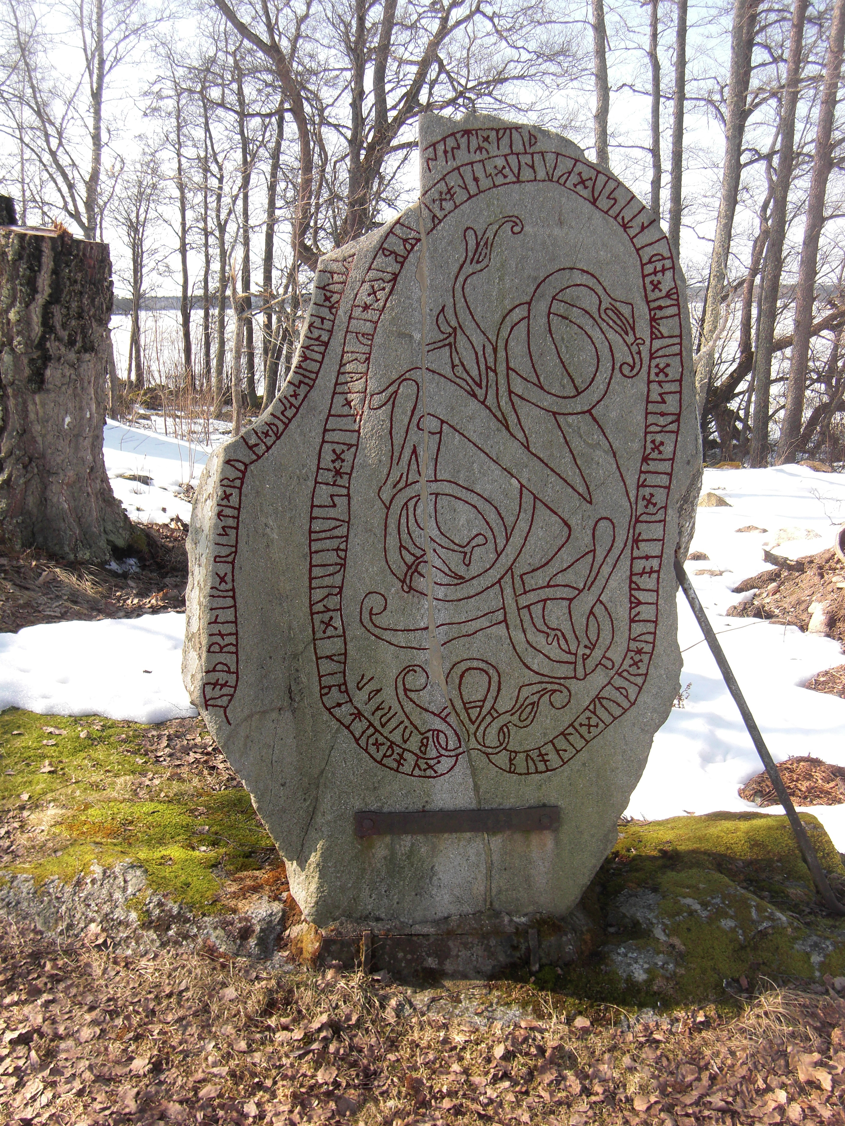 Odendisas sten (Vs 24, RAÄ-nr Fläckebo 4:1) vid hembygdsgården strax söder om Fläckebo kyrka, Fläckebo socken, Norrbo härad, Sala kommun, Västmanlands län, Västmanland, Sverige.